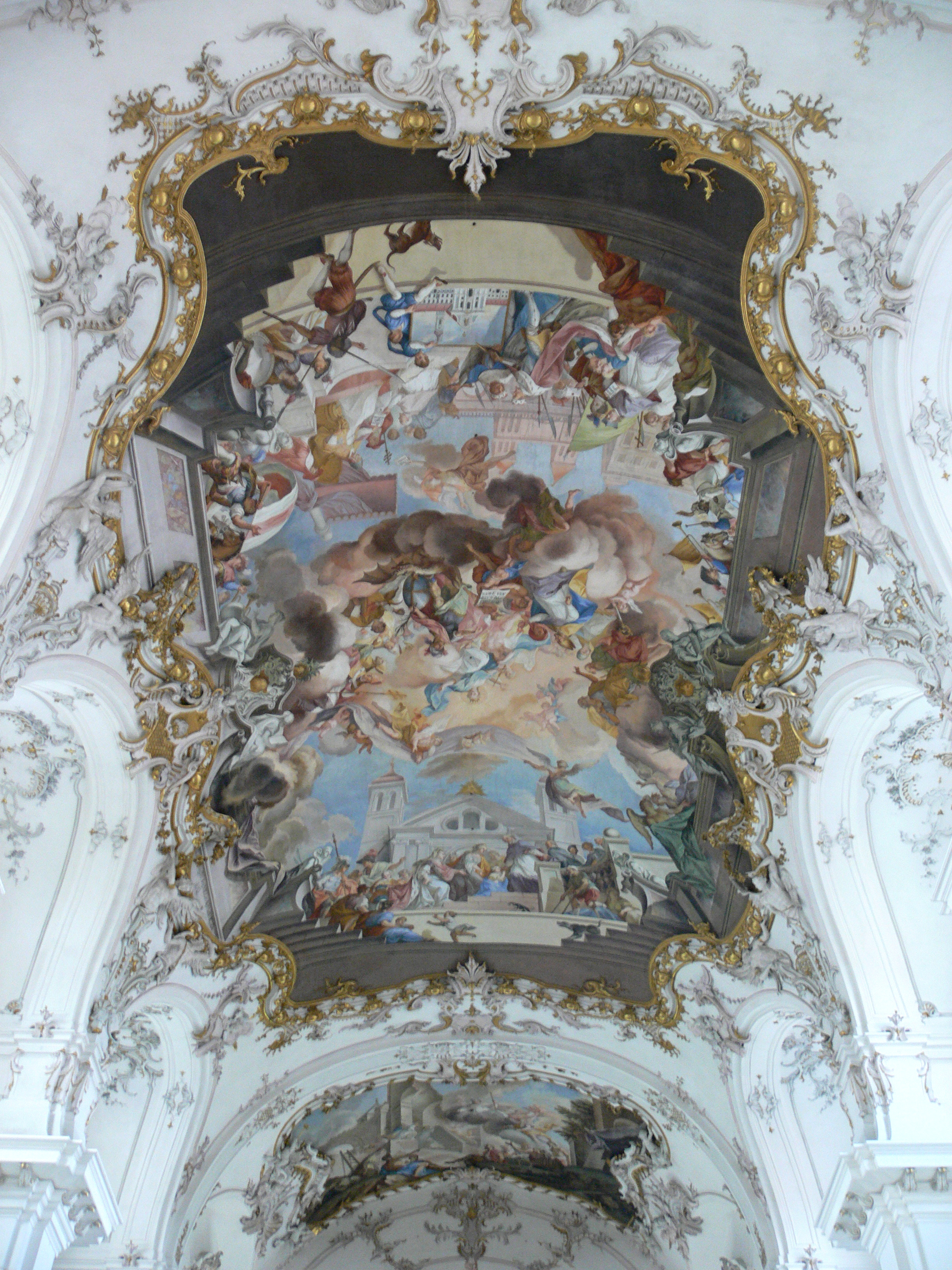 Marienmünster Dießen (ehem. Augustiner-Chorherren-Kirche Mariä Himmelfahrt, heute Pfarrkirche, Dießen am Ammersee) Fresko über dem Langhaus von Johann Georg Bergmüller, 1736: Maria als Himmelskönigin, verehrt von den Schutzpatronen der Dießener Klöster (Mitte), Aufnahme der hl. Mechthildis in das Kloster St. Stephan (unten), Päpstliche Stiftungsbestätigung (oben)" Stuck von Franz Xaver Feuchtmayer d. Ä., Johann Michael Feuchtmayer d. J. und Johann Georg Üblher. Johann Georg Bergmüller (1688–1762) Description German painter Date of birth/death15 April 16882 April 1762Location of birth/deathTürkheimAugsburgAuthority control VIAF: 12577533 LCCN: nr90006283 GND: 118844296 BnF: cb14969519g ULAN: 500006453 ISNI: 0000 0001 0777 4090 WorldCat WP-Person Franz Xaver Feuchtmayer the Elder (1698–1764) Alternative namesFeichtmayrDescription German sculptor Date of birth/death11 August 1698 (baptised)before 28 April 1764Location of birth/deathWessobrunnAugsburgAuthority control VIAF: 50073121 GND: 121087468 Johann Michael Feuchtmayer (1696–1772) Alternative namesJohann Michael Feichtmayr (3)Description German sculptor Date of birth/death17 October 16964 June 1772Location of birth/deathHaid bei WessobrunnAugsburgAuthority control VIAF: 37716385 LCCN: nr94017622 GND: 118974459 WorldCat Johann Georg Üblher (1703–1763) Alternative namesYbelherr, Johann Georg; Üblhör, Johann GeorgDescription German sculptor Date of birth/death23 March 170327 April 1763Location of birth/deathGaispoint bei WessobrunnMaria Steinbach bei Legau